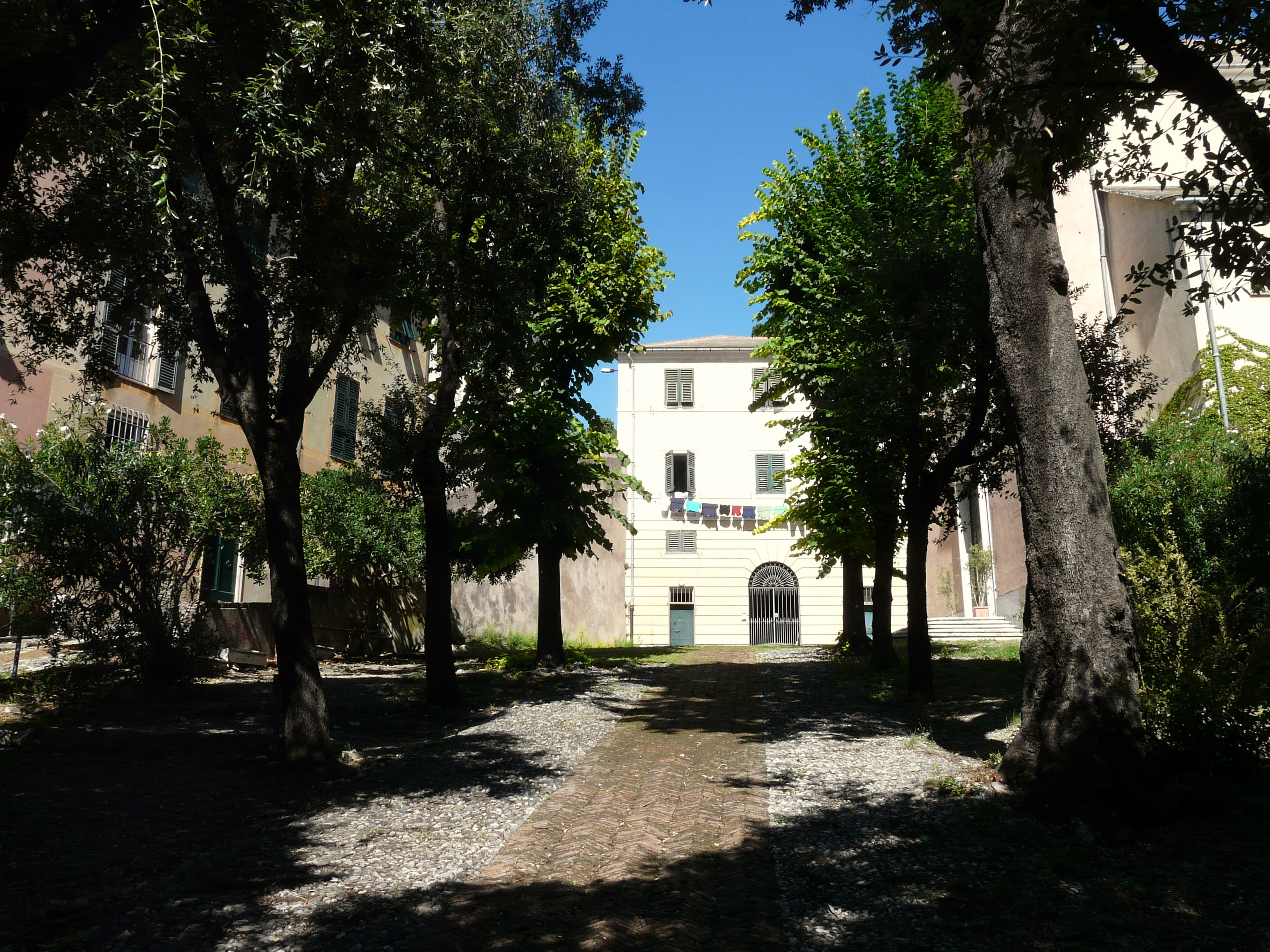 Sagrato della chiesa di Sant'Anna, Genova, Liguria, Italia